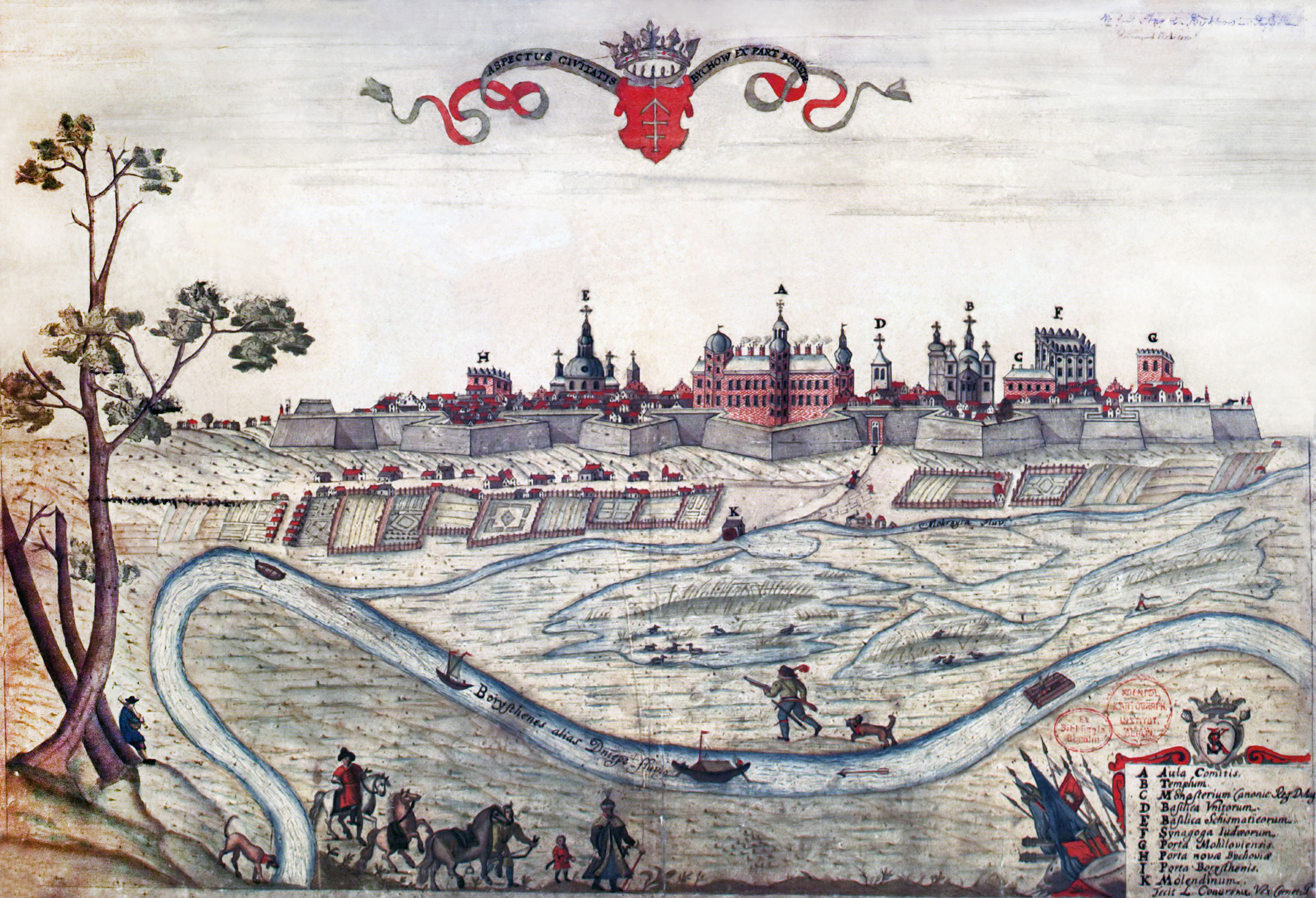 Беларуская (тарашкевіца): Быхаў (Bychaŭ). Панарама места